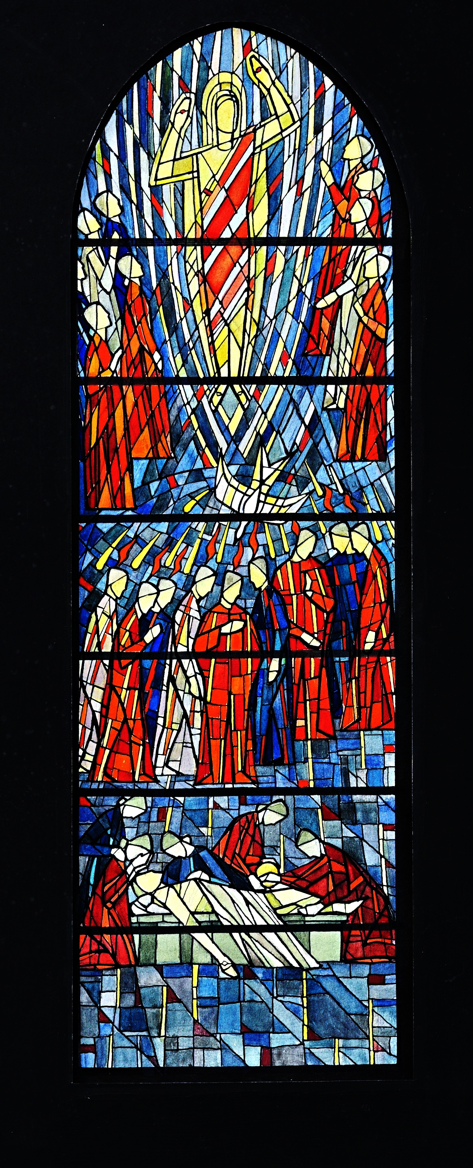 1958, Günter Johl, farbiger Entwurf für das Altarfenster von St. Marien in Altlandsberg. Dargestellt ist die Grablegung Christi, das Pfingstwunder und Christi Himmelfahrt. Der Entwurf befindet sich im Besitz der Tochter des Künstlers, Amadee Vorsteher-Johl.